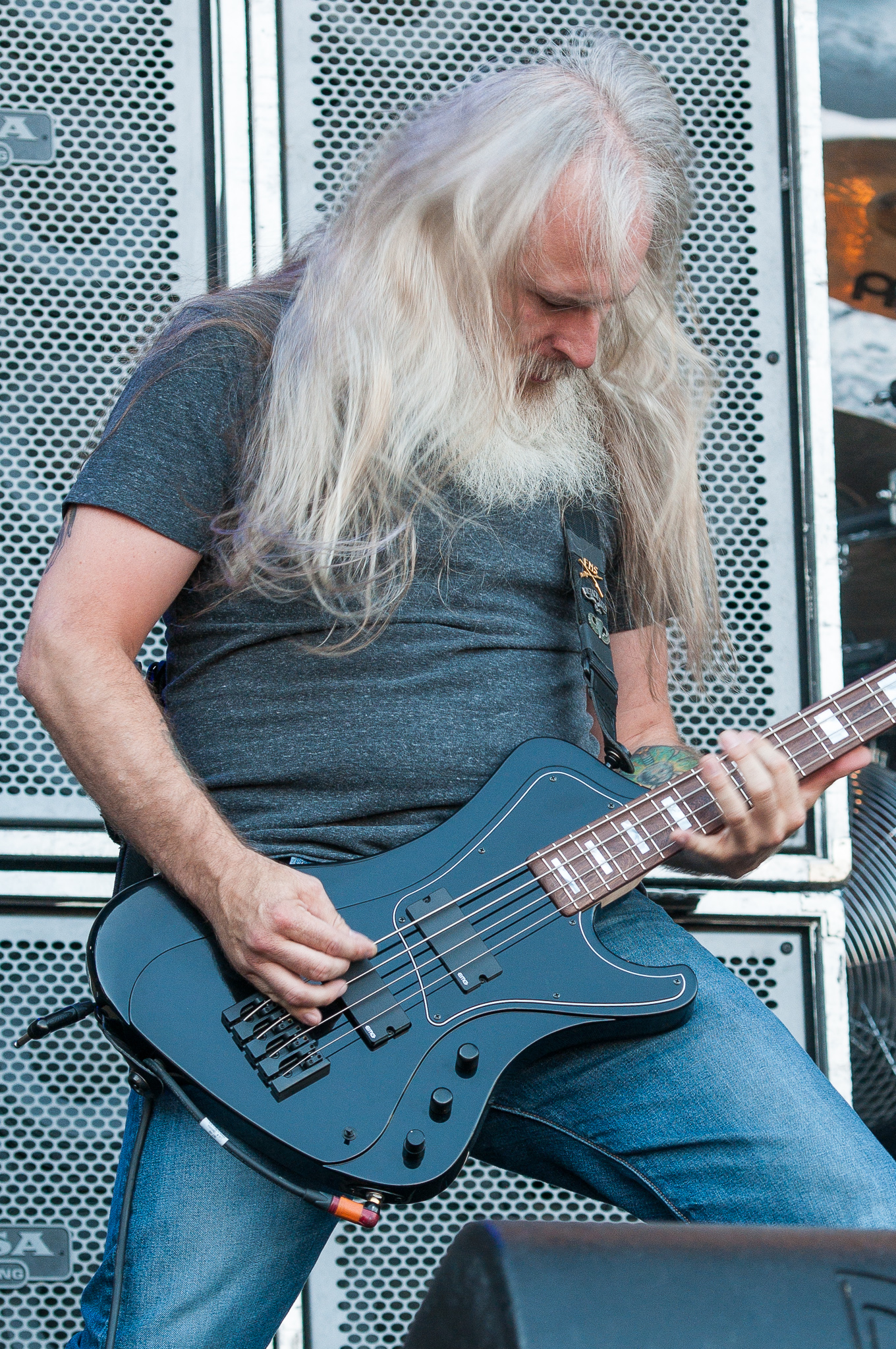 ARGO-Konzerte,Beck's Park Stage,Festival,John Campbell,Konzert,Lamb of God,Livekonzert,Livemusik,Musik,RiP,Rock im Park 2015